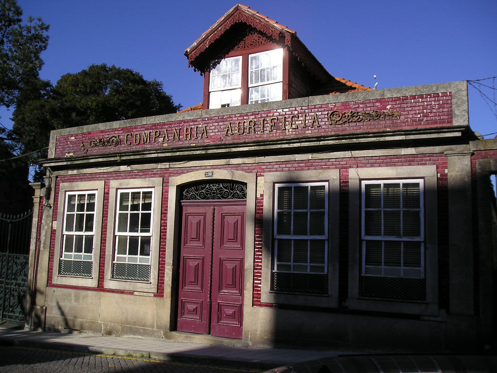 Companhia Aurifícia, Rua dos Bragas, Cedofeita, Porto.